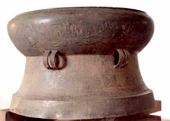 Tambour Heger 1 ( D. 96cm H. 57cm ) Musée national de Phnom-Penh